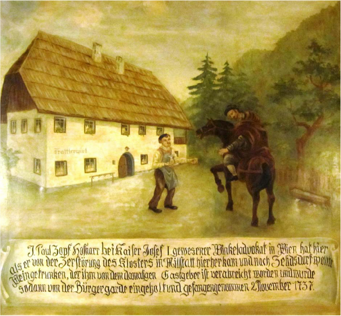 Paul Zopf vor dem Trattlerhof. Gemälde, einst an der Außenwand des Trattlerhofs ausgeführt.